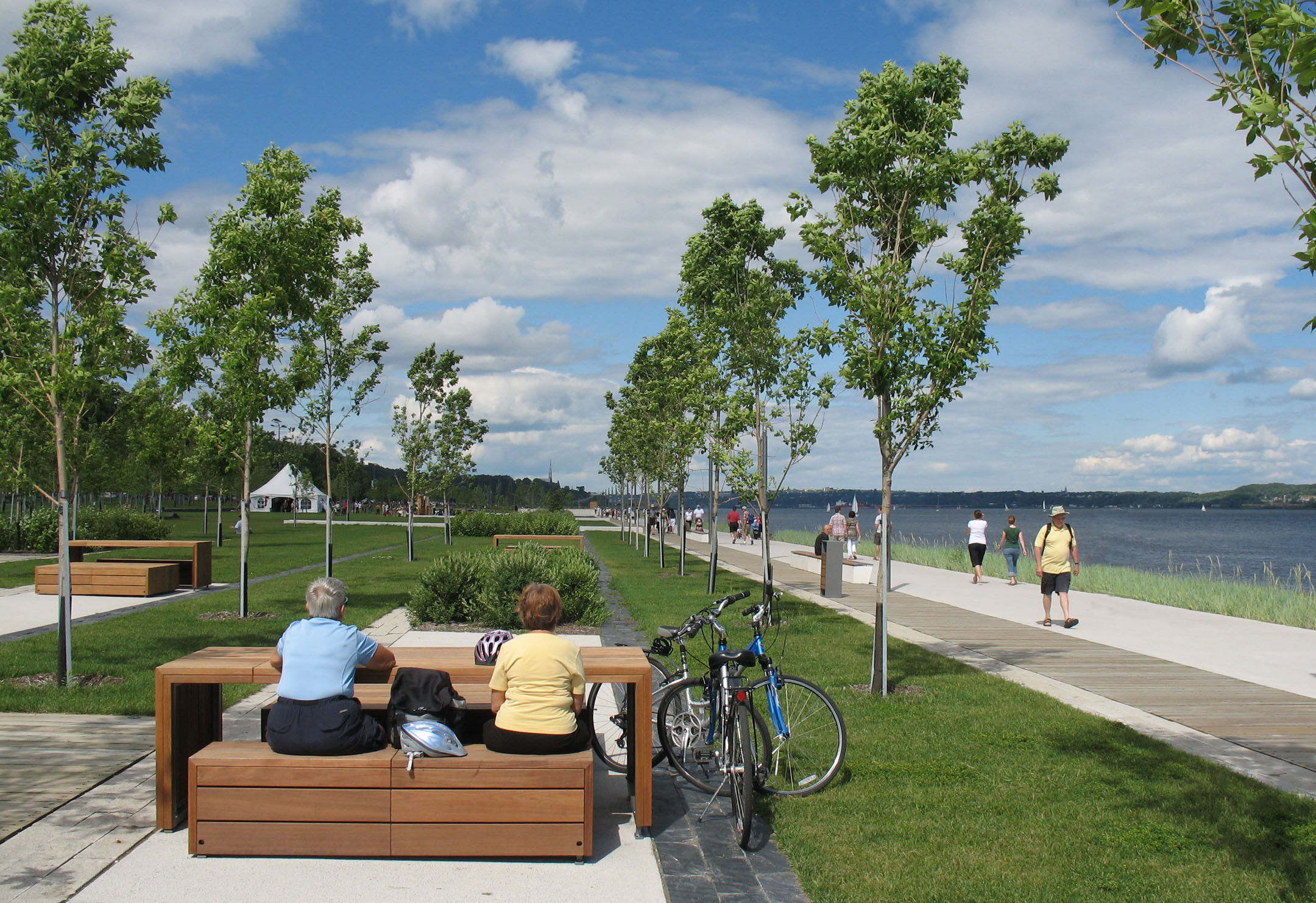 Promenade Samuel-De Champlain, station des Cageux, Ville de Québec, province de Québec, Canada